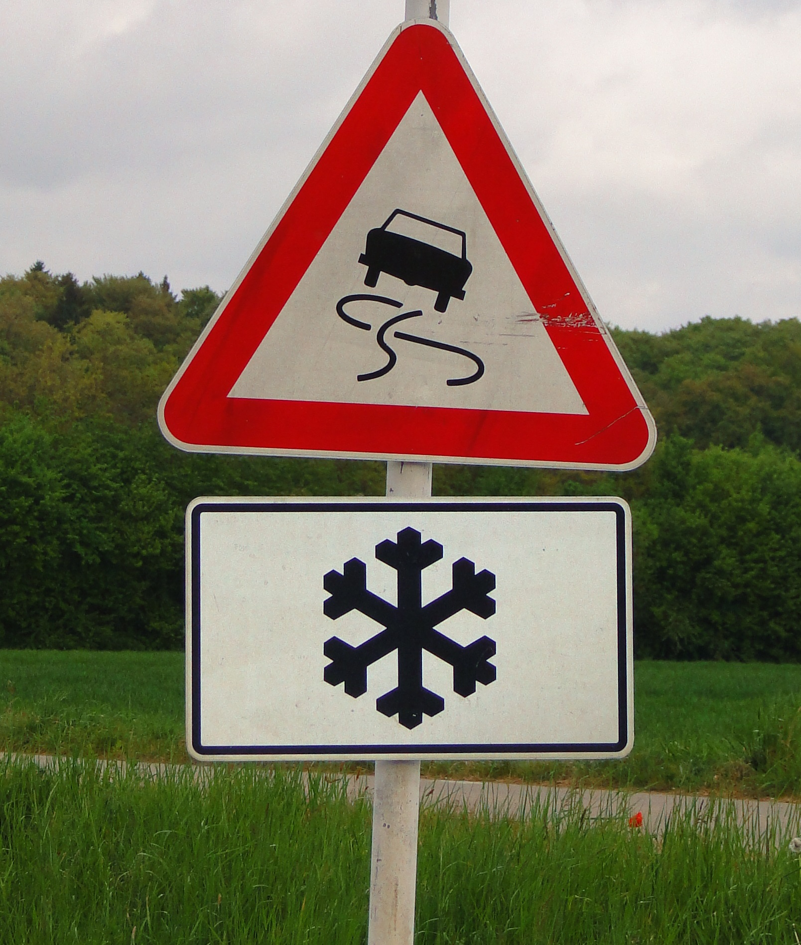 Verkéiersschëld A,8 aus dem Lëtzebuerger Code de la route mam Zousazschëld Modell 8